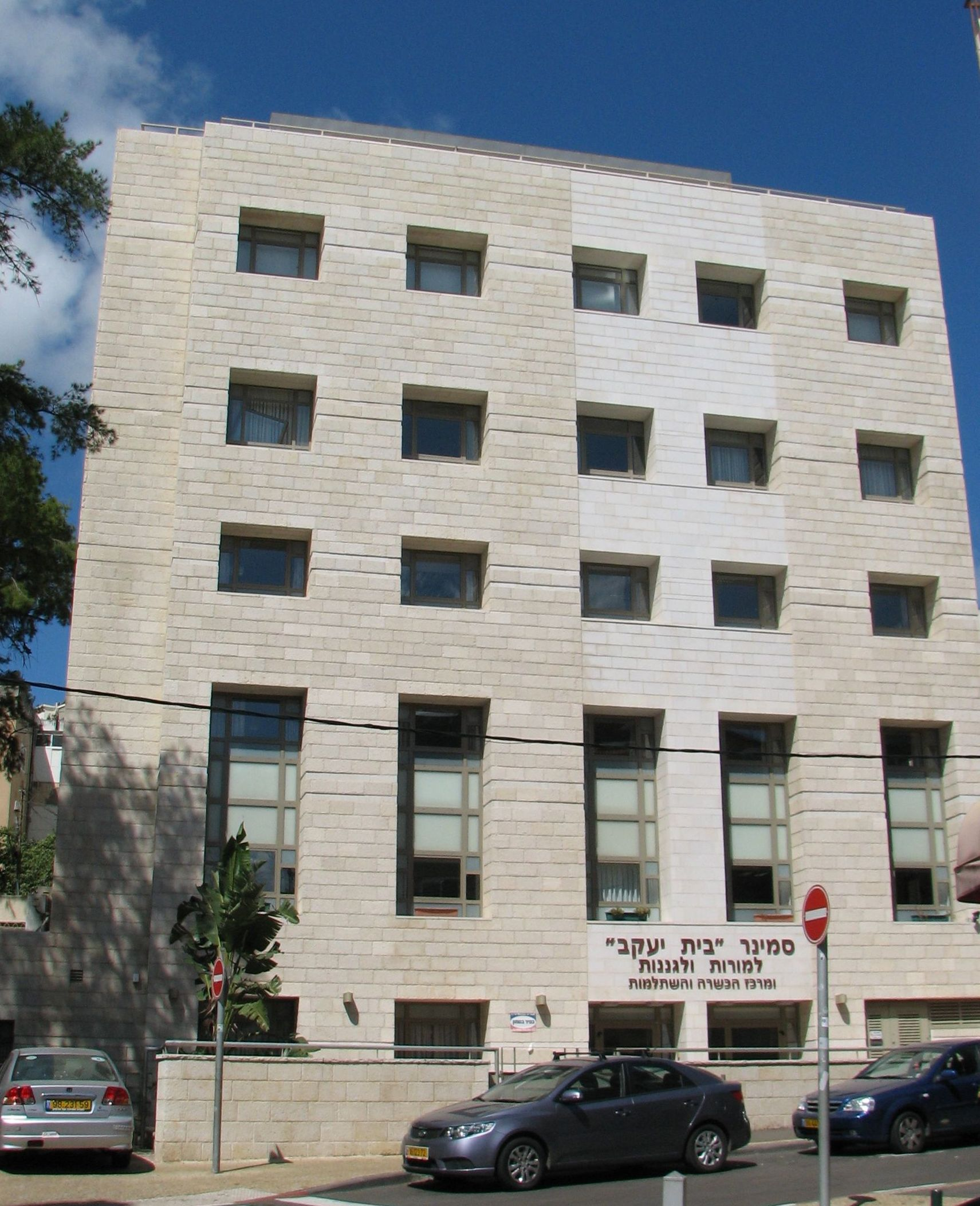 Beit Yaakov Seminar, Hadar Hacarmel, Haifa Israel מבנה סמינר בית יעקב ברחוב חרמון 10 באזור מזרח הדר הכרמל. הסמינר שוכן במקום שבו שכן בעבר "בית הנוער" מרכז קהילתי לנוער דתי לאומי אזור חיפה. בית יעקב הוא שמה של רשת בתי ספר חרדית לבנות